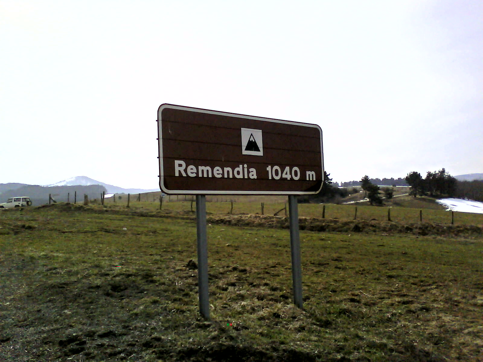 Erreniegako mendatea.